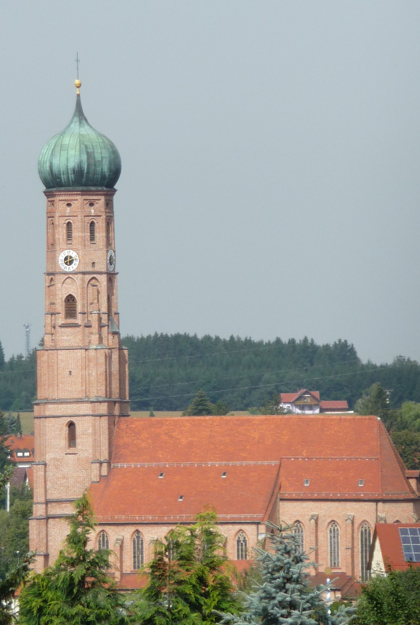 Die Stadtpfarrkirche Maria Himmelfahrt in Vilsbiburg